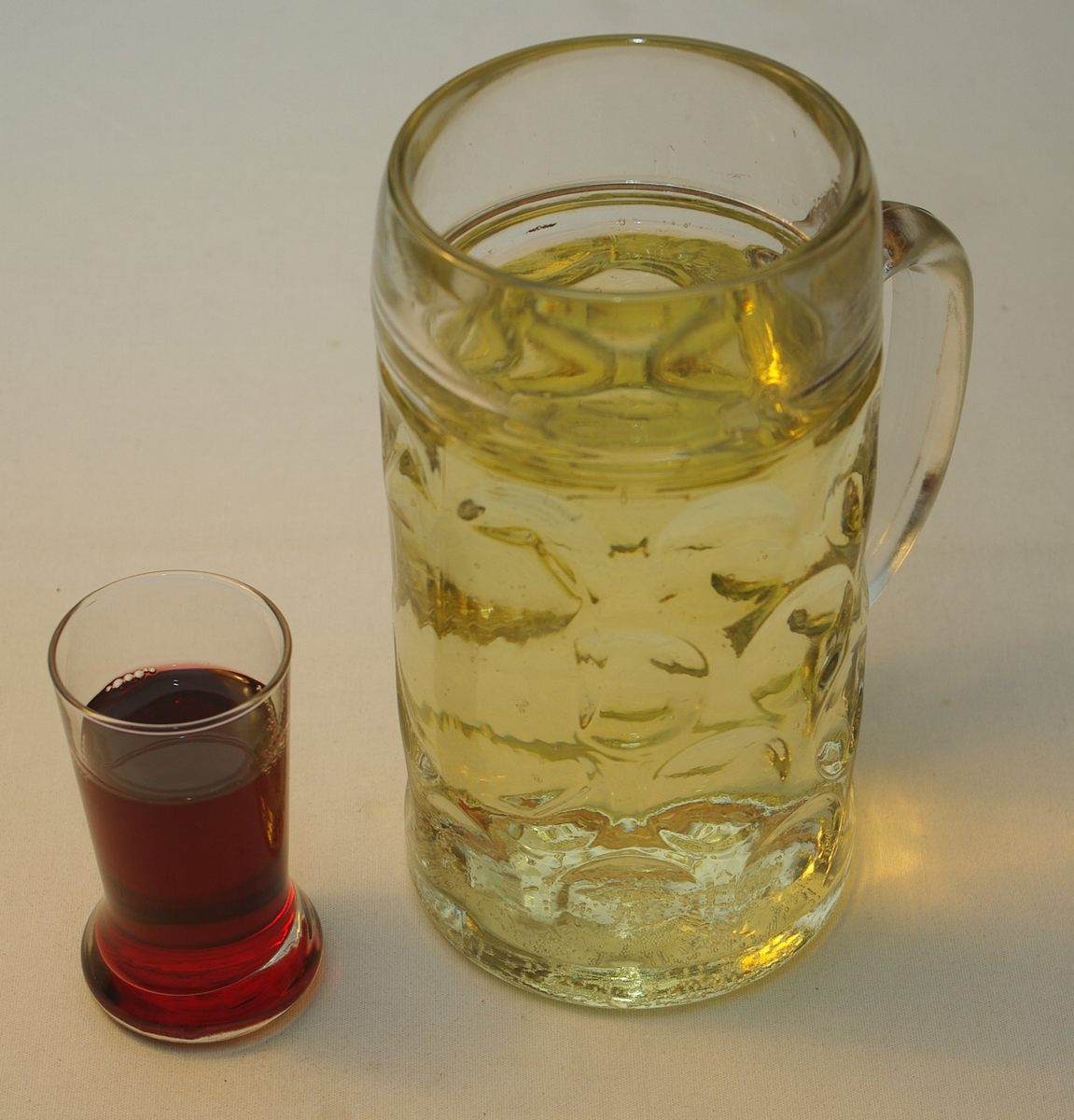 Laterndlmaß während der Zubereitung. Süße Weinschorle (trockener Weißwein, Zitronenlimonade) befindet sich bereits im Maßkrug, daneben ein Glas mit Kirschlikör.